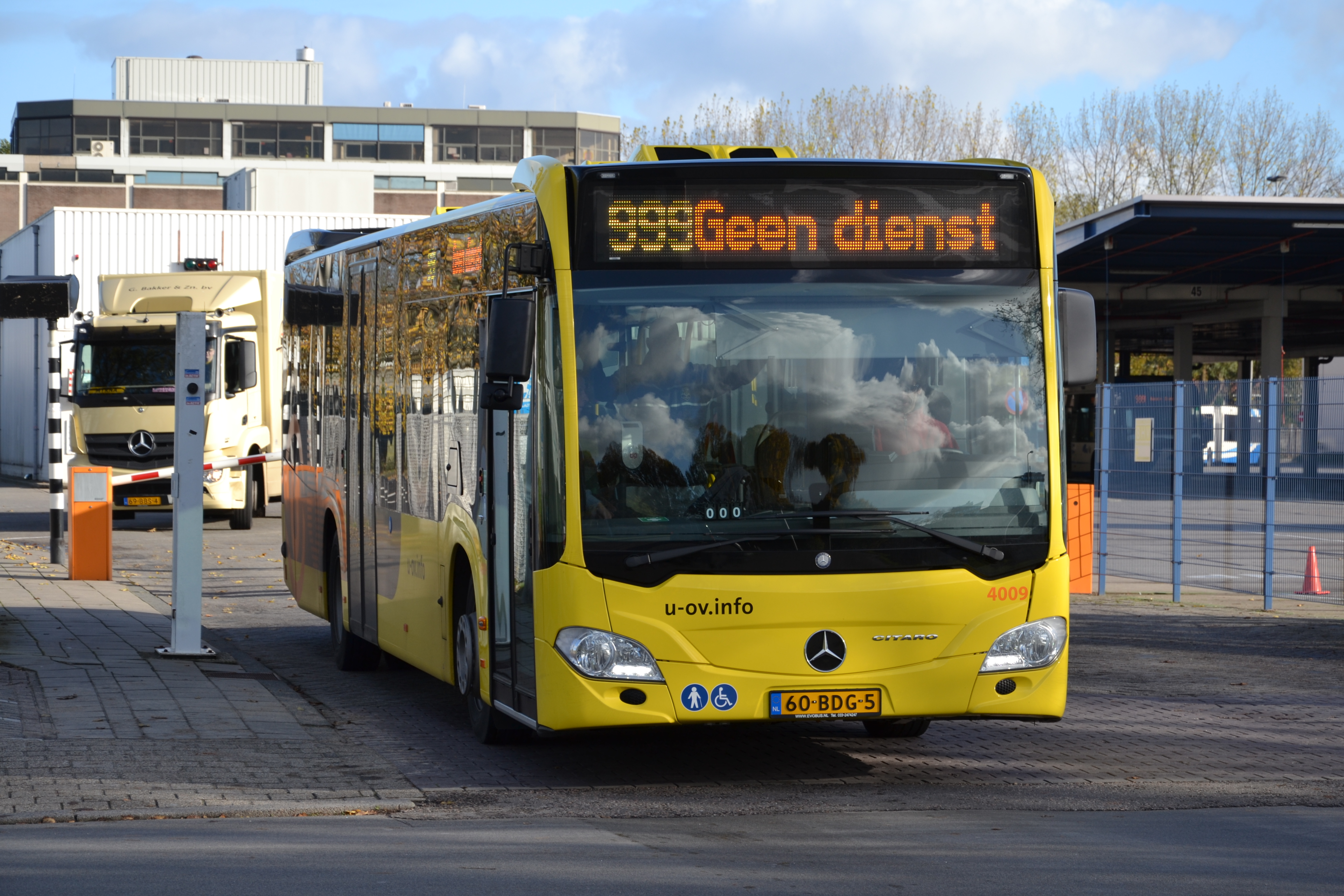 Een gloednieuwe Qbuzz-citaro, de 4009, bij de remise Europalaan.